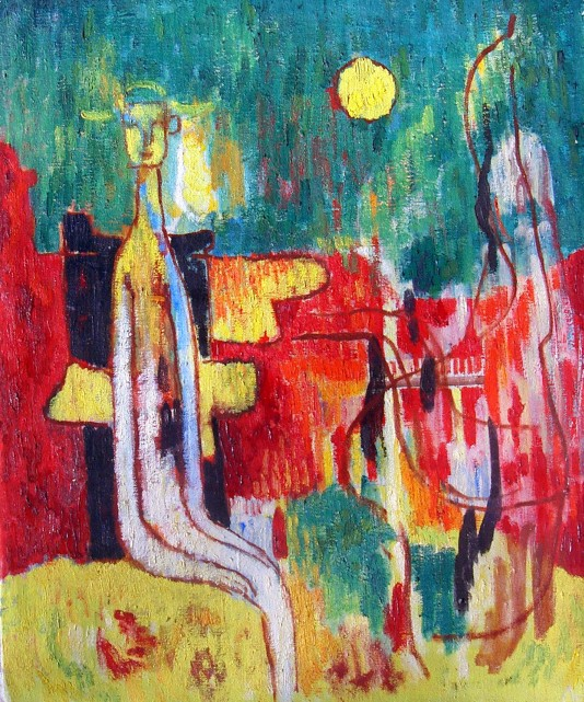 Einsamkeit, George Stefanescu, Öl/Leinwand, 1978, Privat Sammlung Dipl.Ing.Radu Stefanescu-Gross, Bukarest, Rumänien.